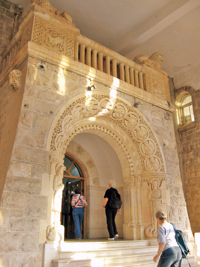 Augusta Victoria in Jerusalem